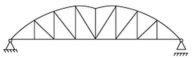 Symmetrische Trägerform mit theoretisch exaktem Gurtverlauf